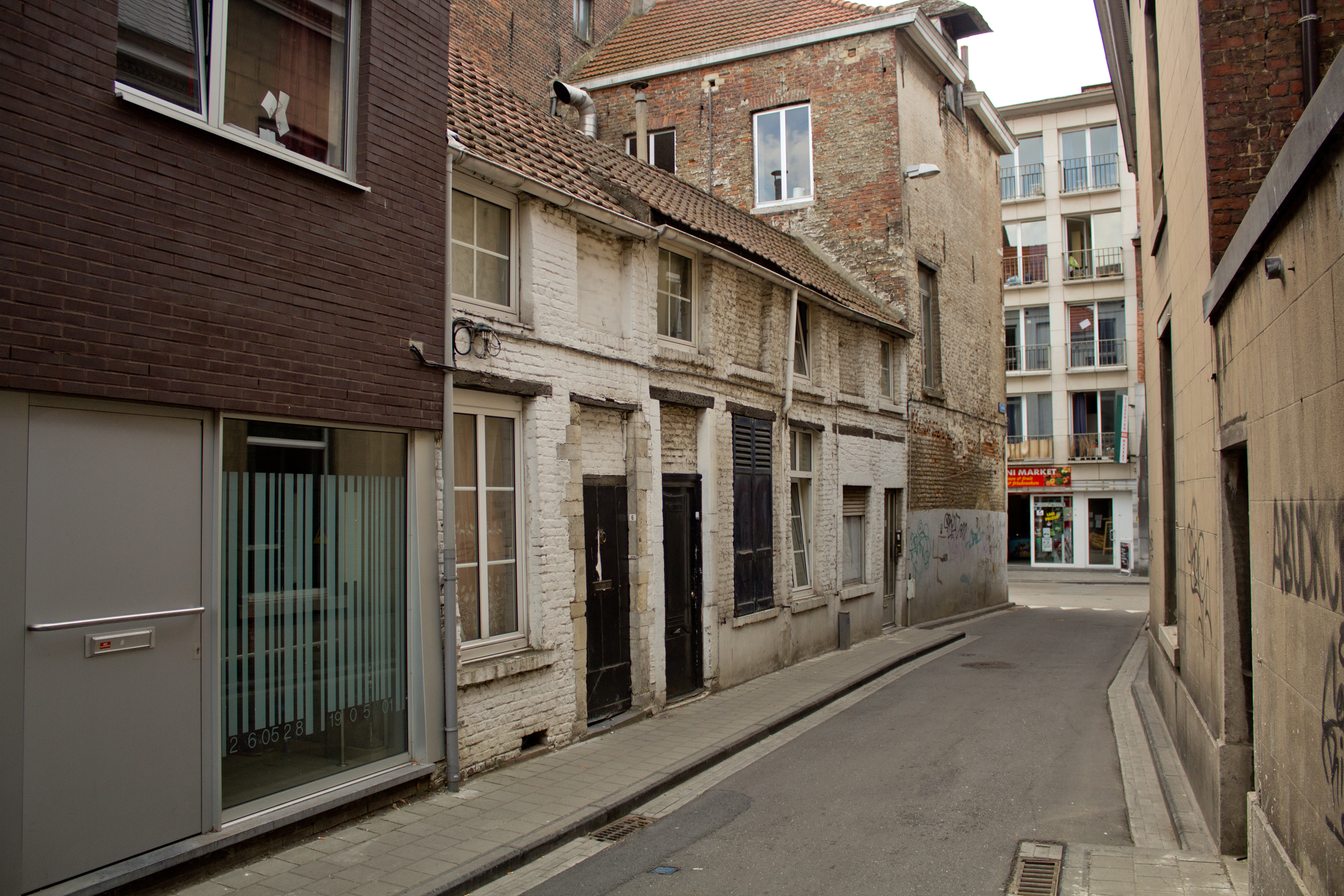 Verwaarloosde arbeiderswoningen aan de Ravenstraat 4-8, Leuven